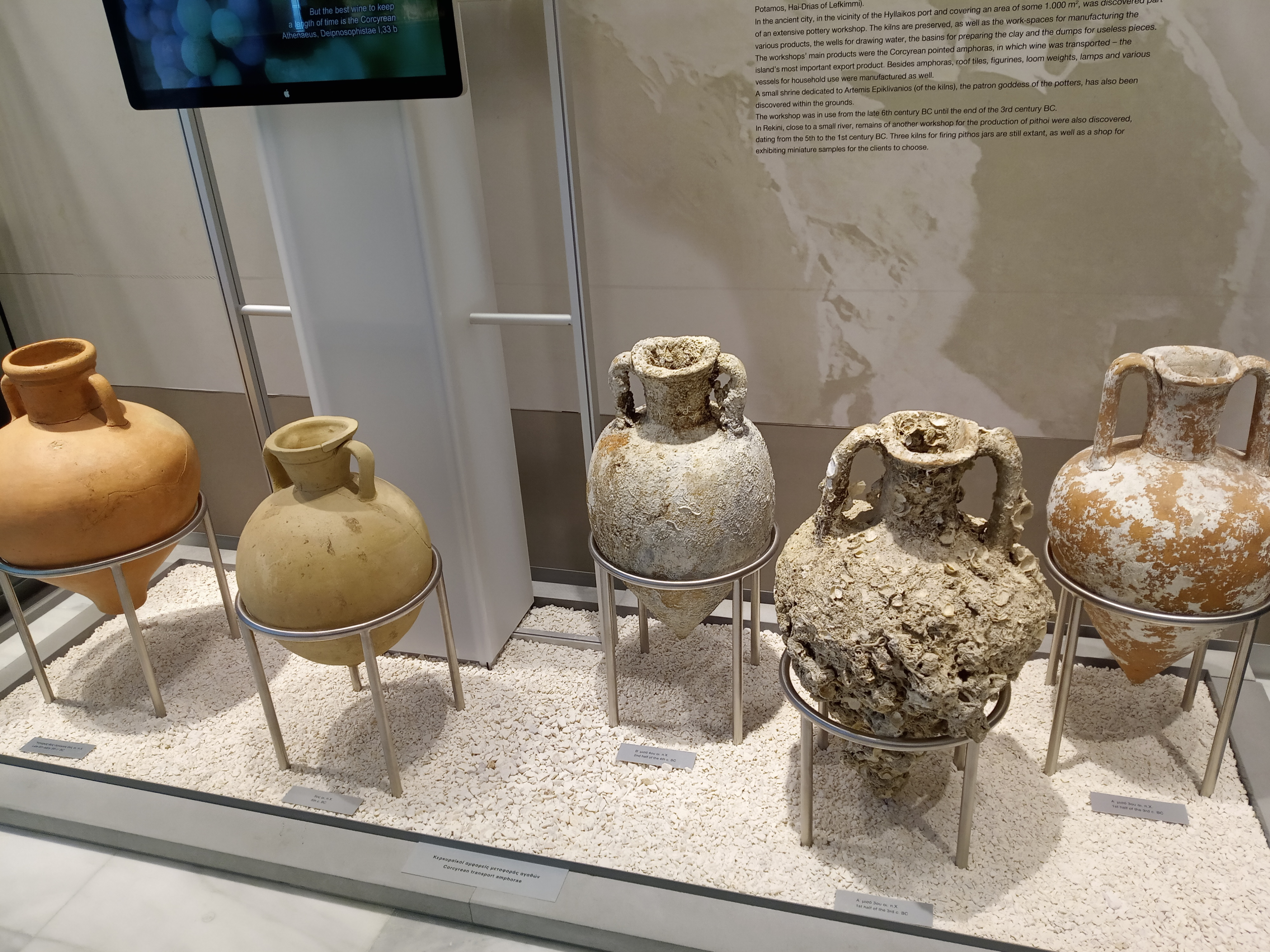 Археологічний музей Керкіри, греція, острів Керкіра